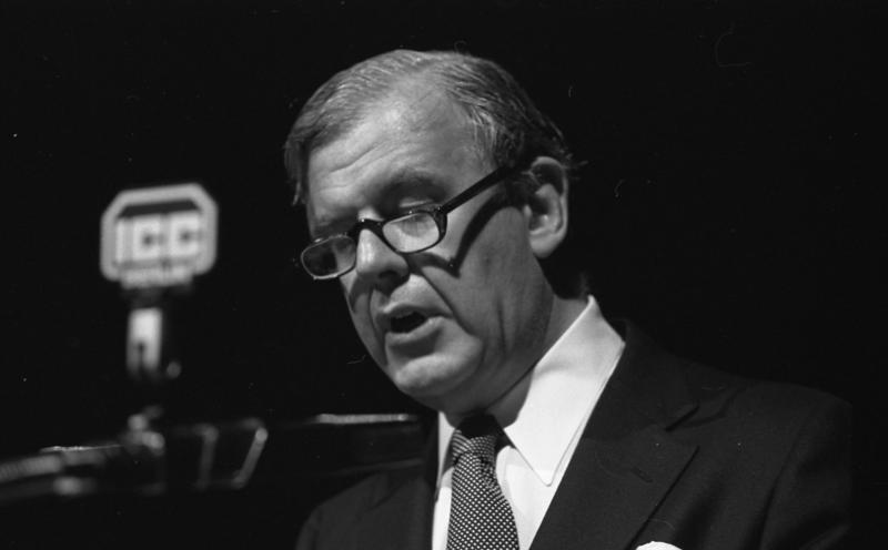 Grüne Woche Berlin- Eröffnungsveranstaltung im ICC.